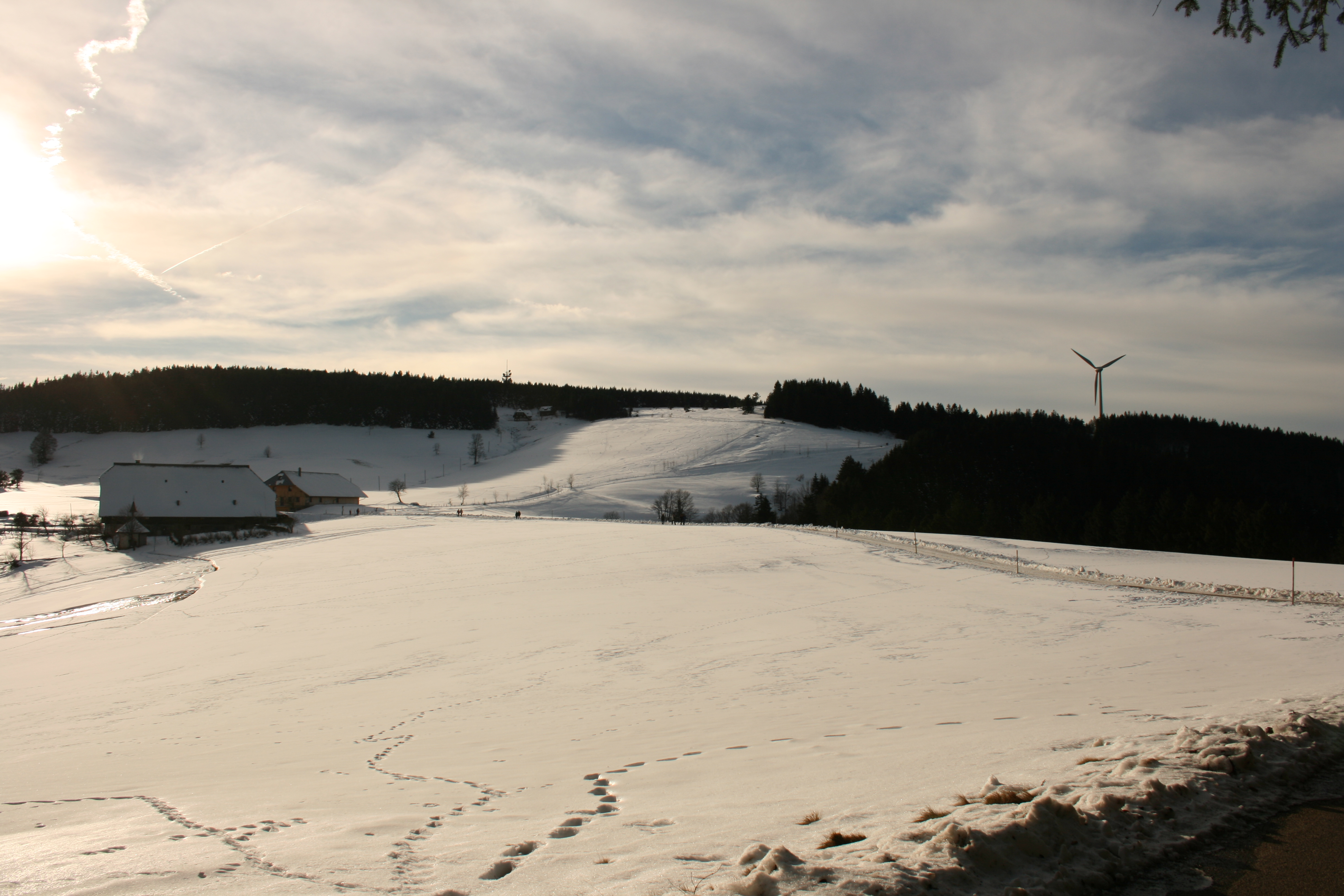 Rohrhardsberg Der Gipfel vom Rohrhardsberg im Scharzwald.